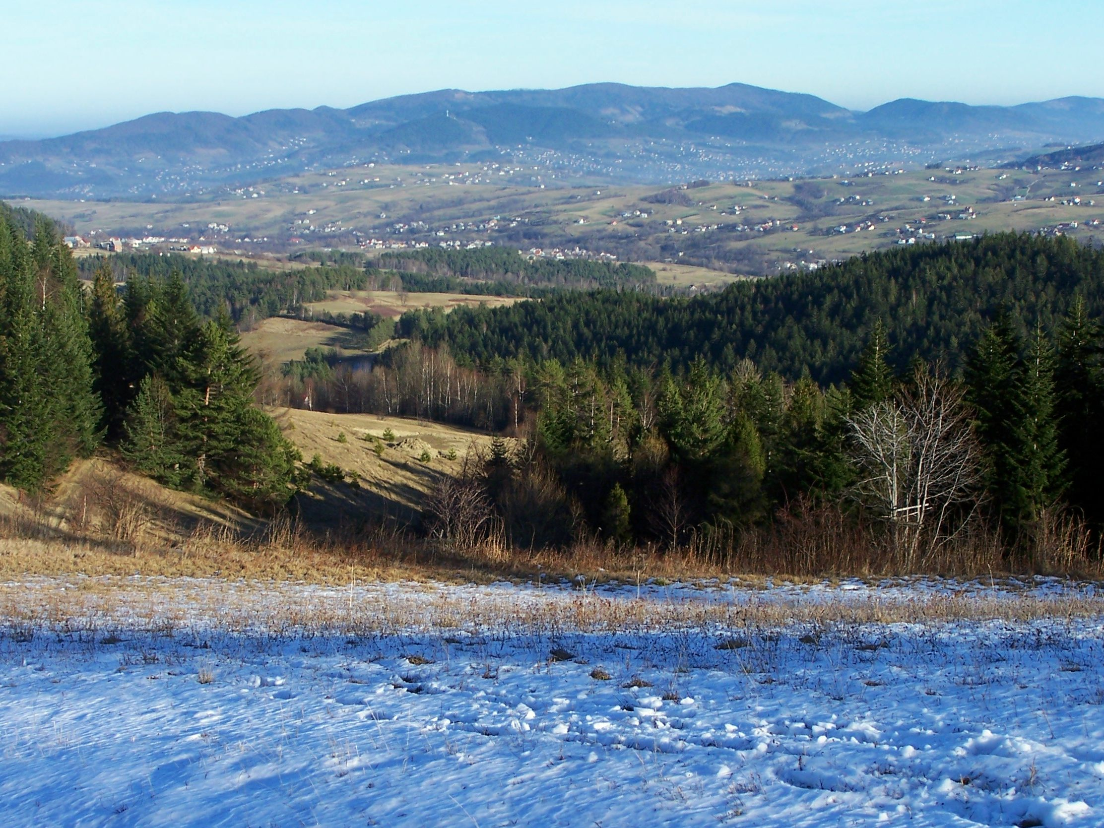 Słopnice, view from Mogielica. Widok ogólny z Mogielicy. W głębi Łososińskie Pasmo.